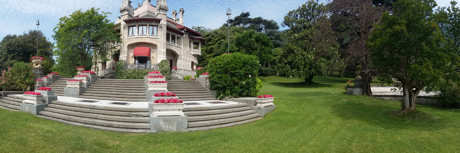 Villa Faccanoni Giuseppe, architect: Giuseppe Sommaruga